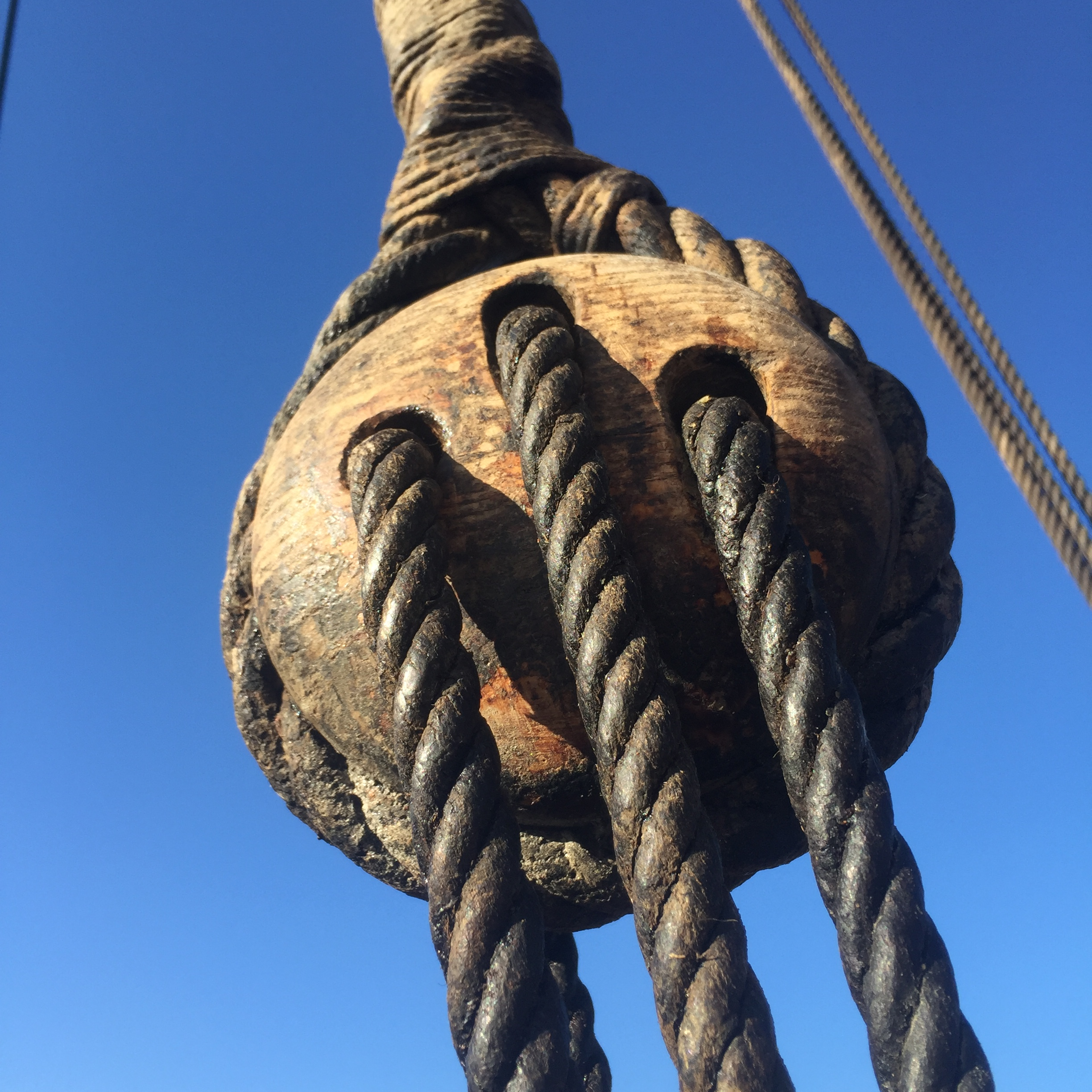 Jomfru. Rigg. Råsegl.